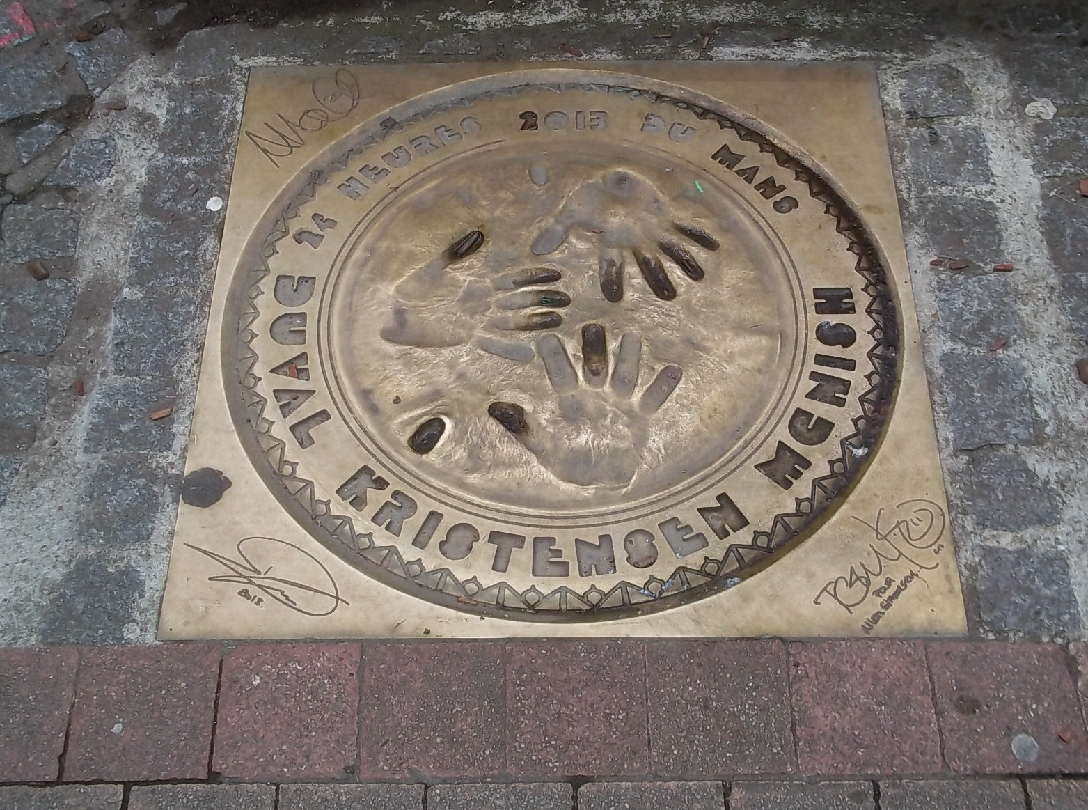 Plaque de bronze des empreintes des vainqueurs des 24 heures 2013